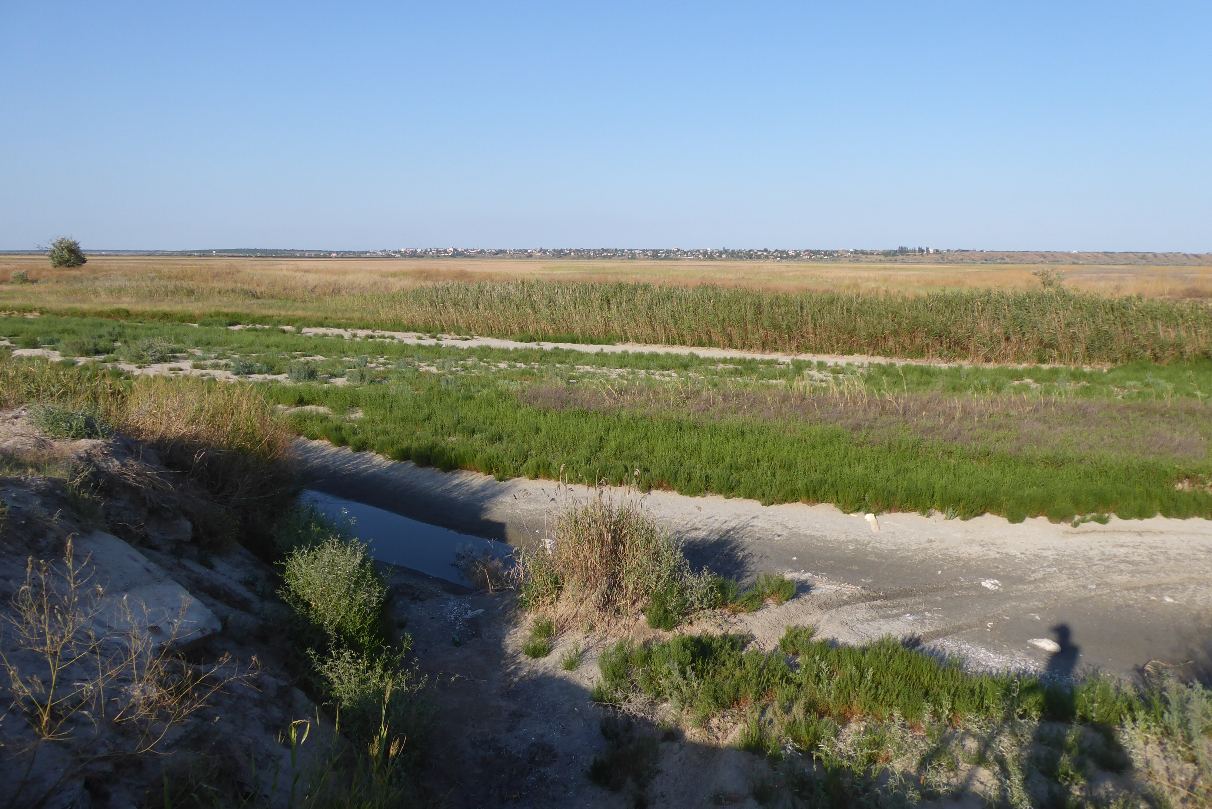 Пересохлий канал "Тилігульский лиман – Чорне море" у 2017 році, до розчистки